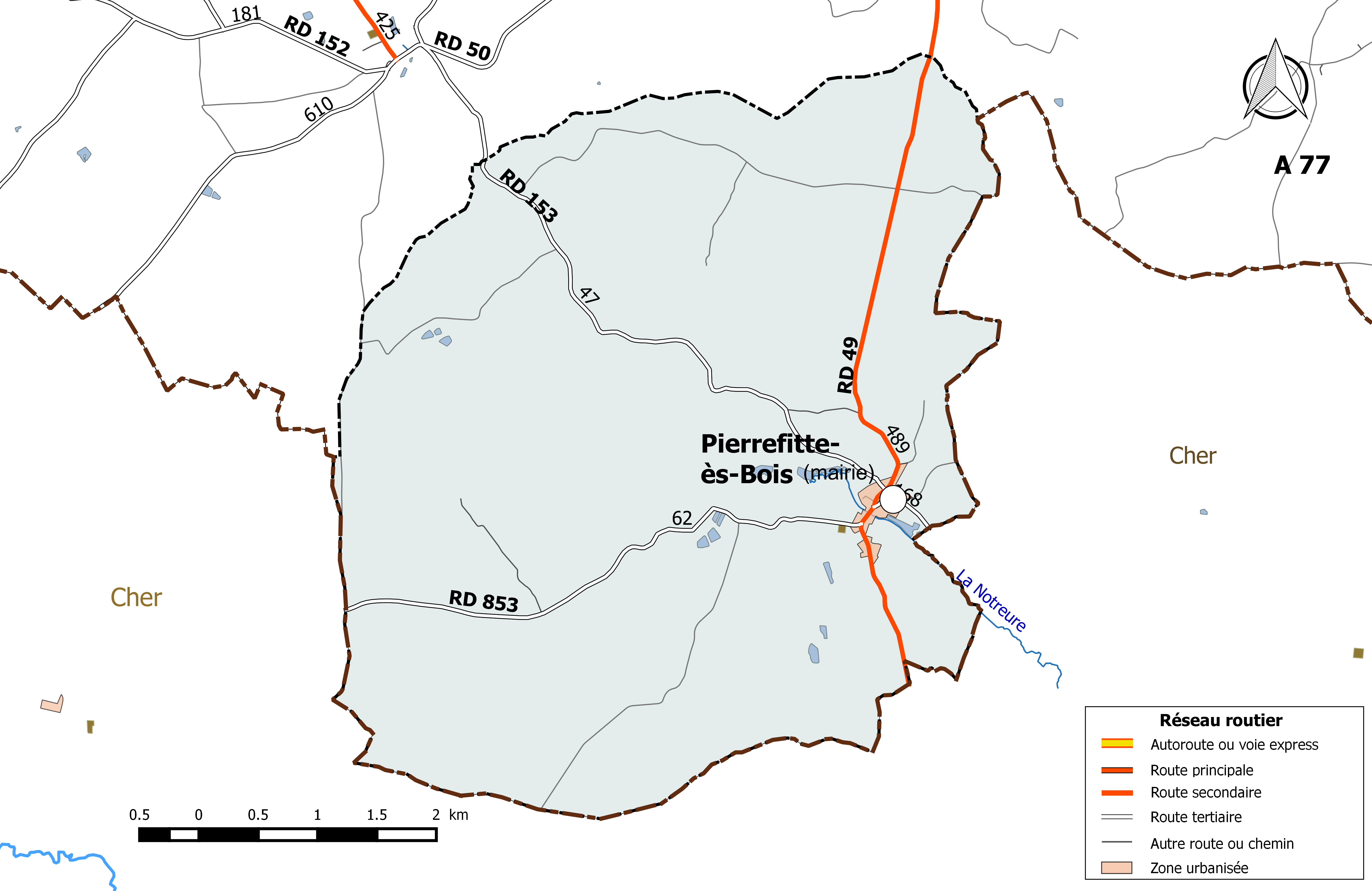 Carte du réseau routier de la commune de Pierrefitte-ès-Bois.